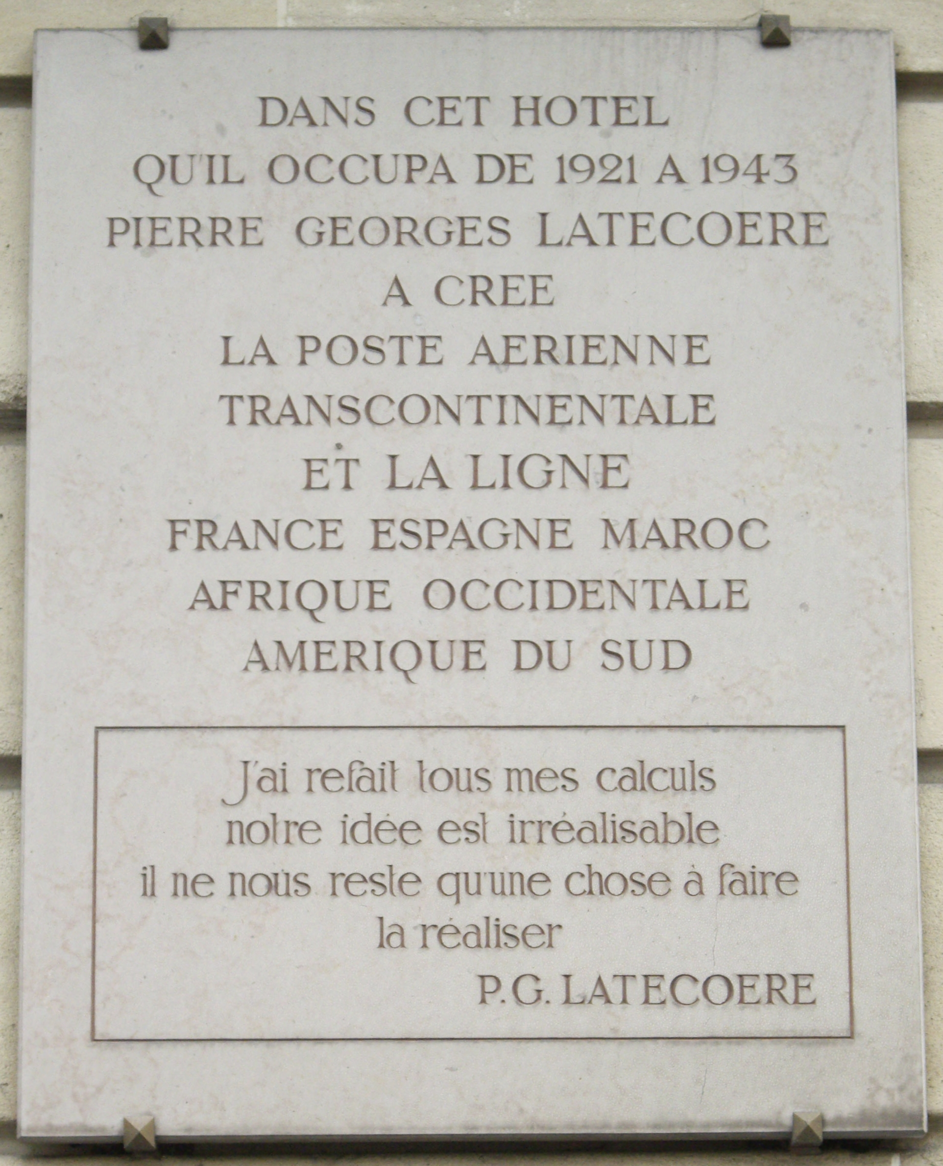 Plaque commémorative, 79 bis avenue Marceau, Paris 16e.« Dans cet hôtel qu'il occupa de 1921 à 1943, Pierre Georges Latécoère a créé la poste aérienne transcontinentale et la ligne France — Espagne — Maroc — Afrique occidentale — Amérique du Sud.J'ai refait tous mes calculs, notre idée est irréalisable. Il ne nous reste plus qu'une chose à faire : la réaliser. — P. G. Latécoère. »